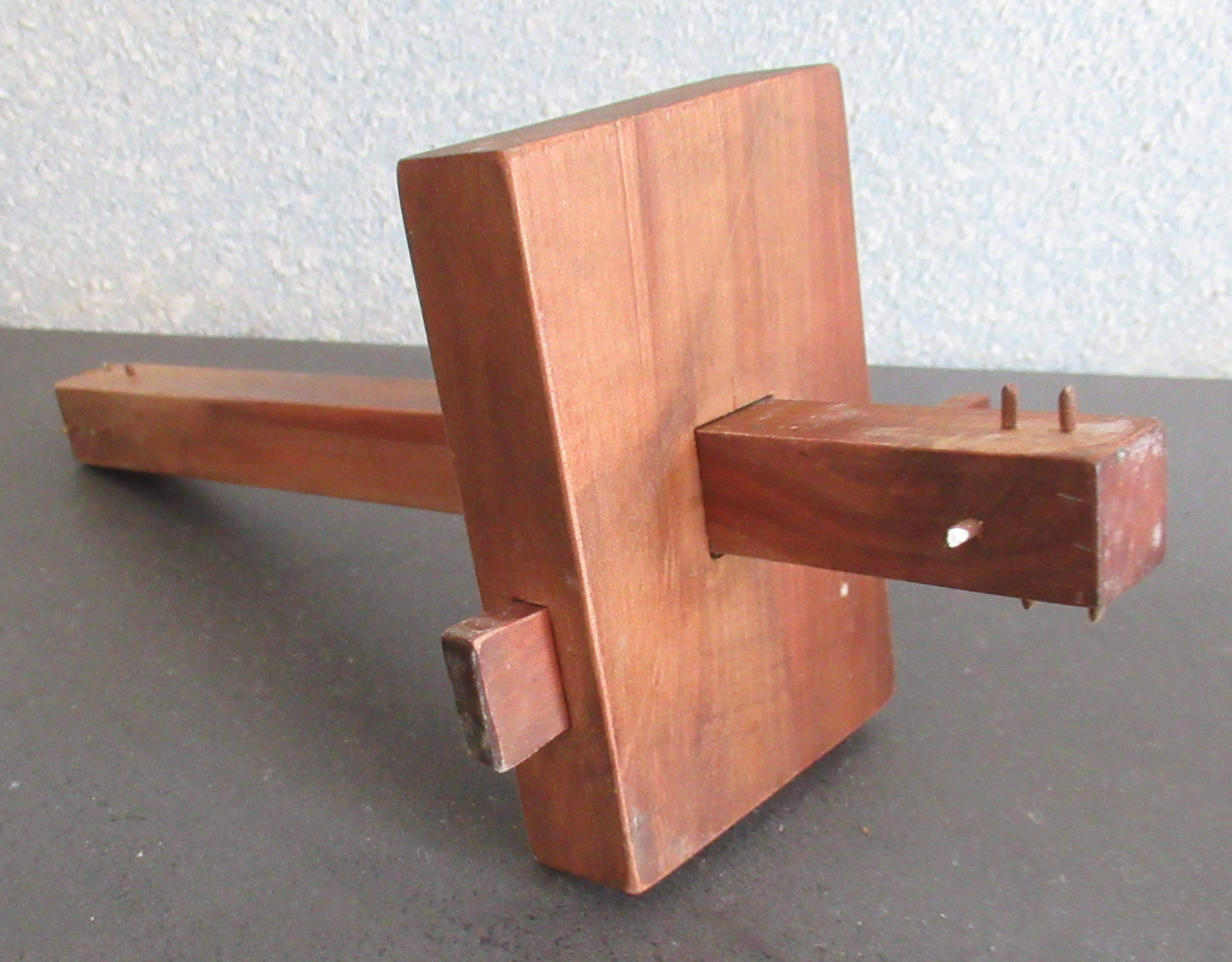 Trusquin de menuisier (outil de traçage), réalisé en bois de cormier (Sorbus domestica).